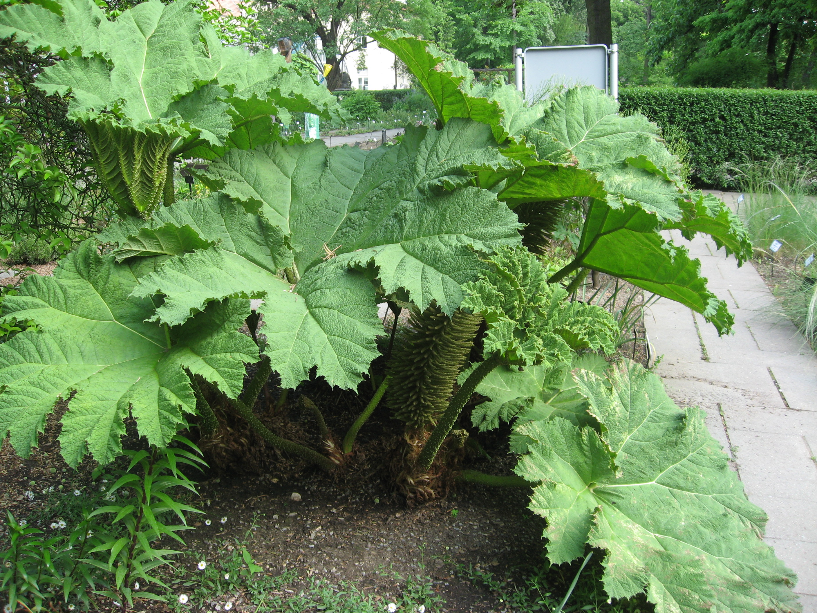 Ein Mammutblatt (auch: Riesen-Rhabarber).